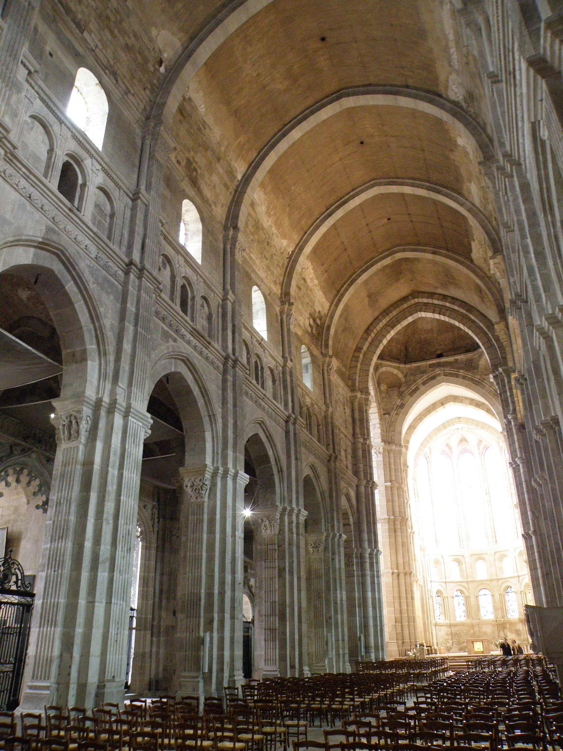 Autun (Saône-et-Loire, Bourgogne, France). Cathédrale Saint-Lazare. Vaisseau central.